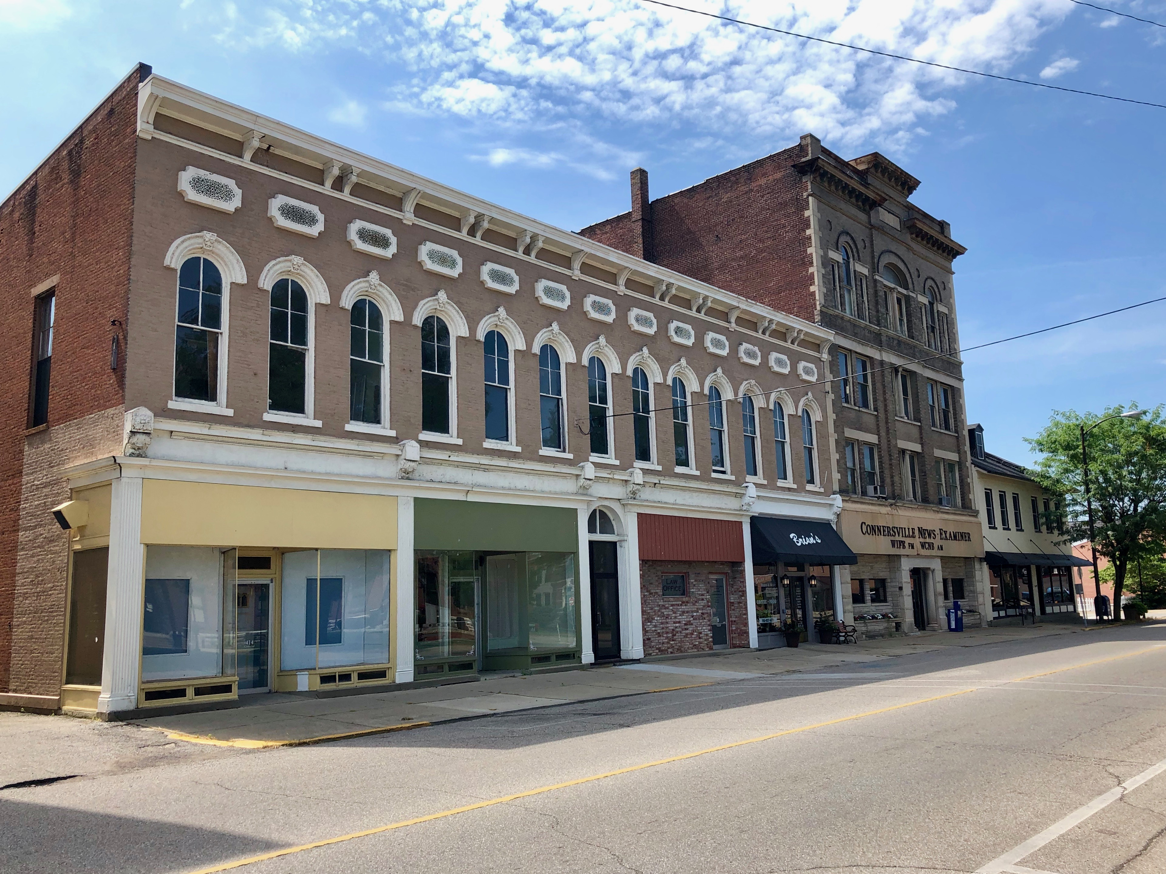 Central Avenue, Connersville, IN